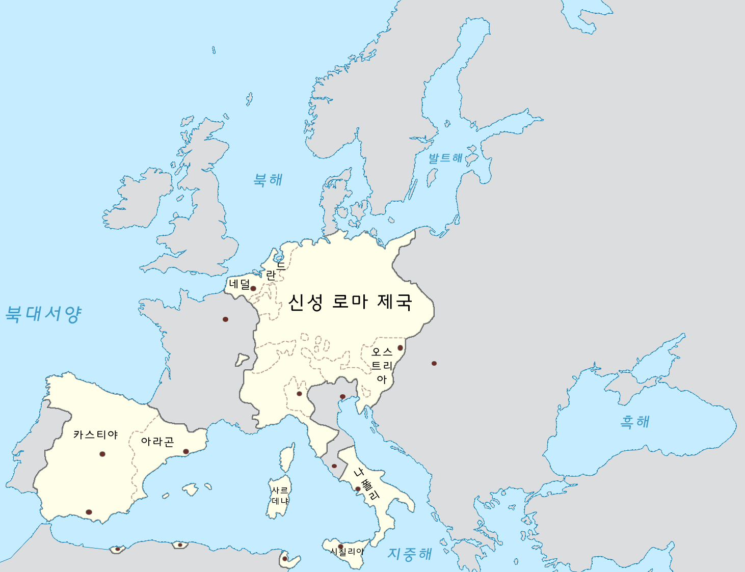 카를 5세 시기 합스부르크 제국의 강역